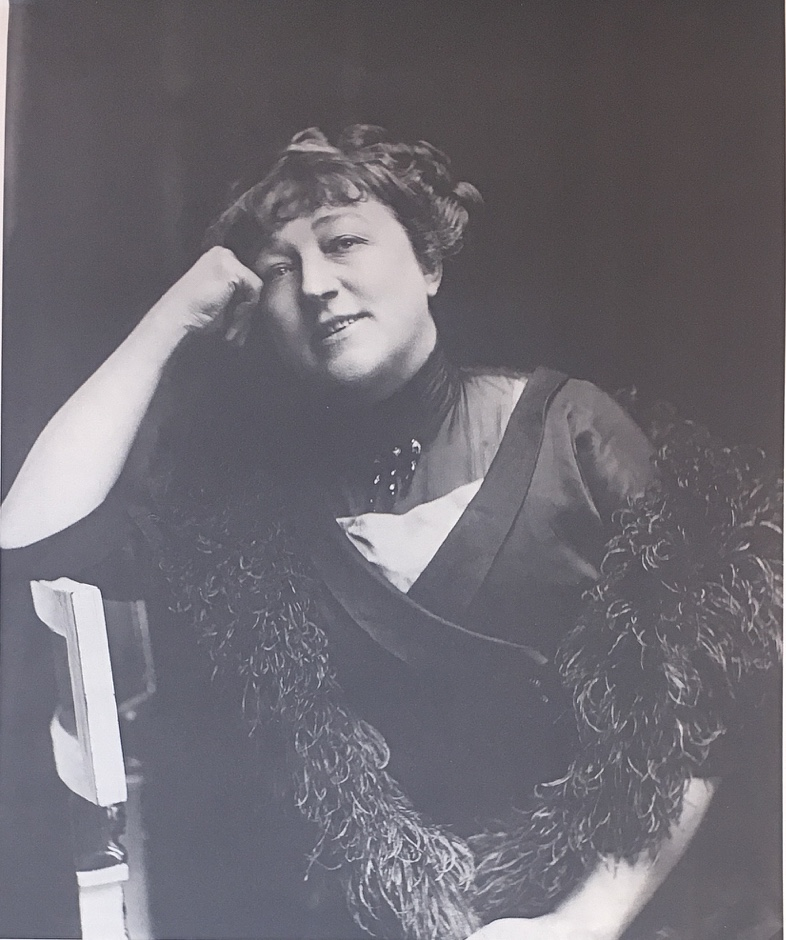 Anna Hofman-Uddgren. IMG 9217